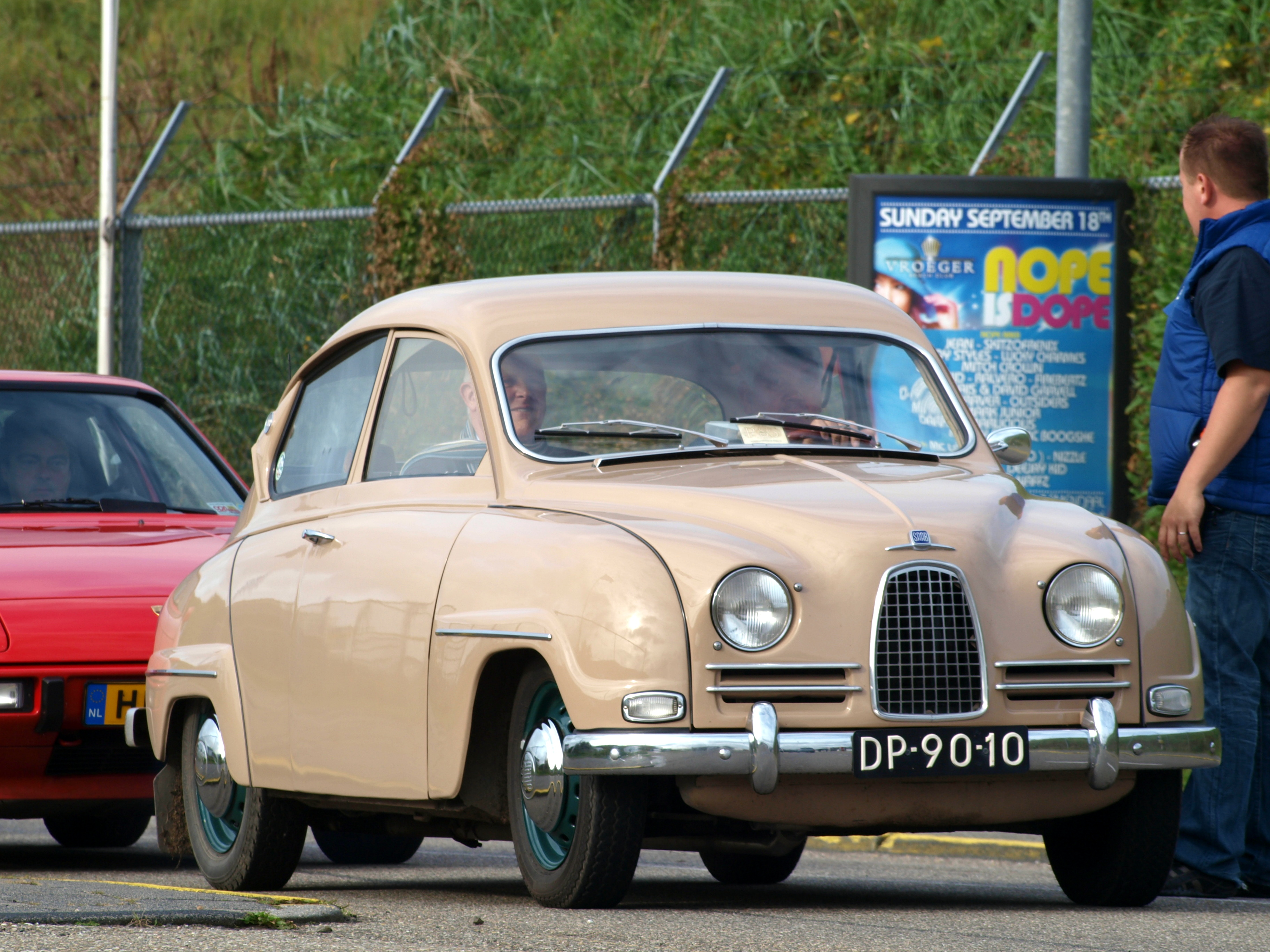 Nationaal Oldtimer Festival Zandvoort 2011.